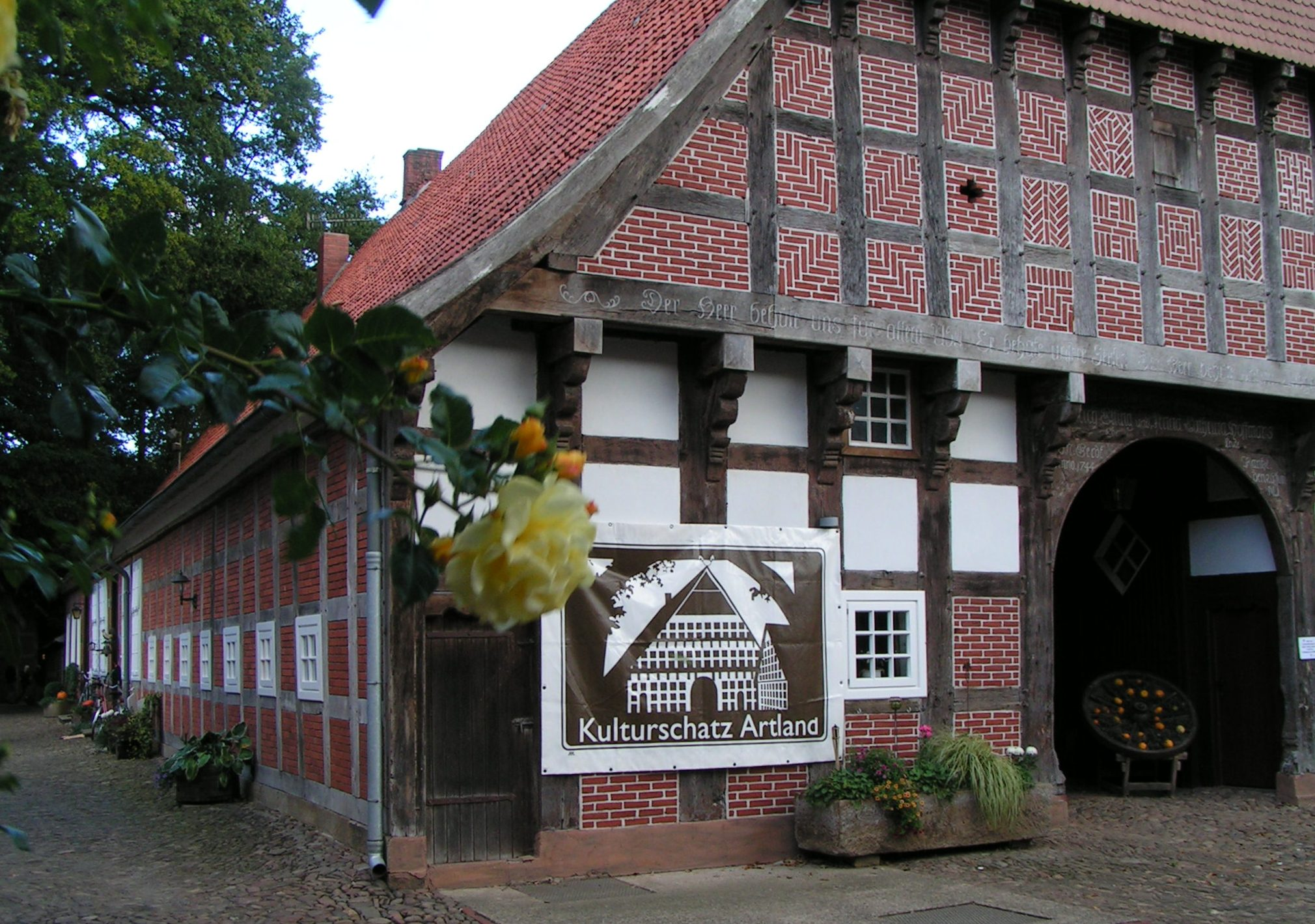 Artländer Bauernhof in Vehs (Gemeinde Badbergen)